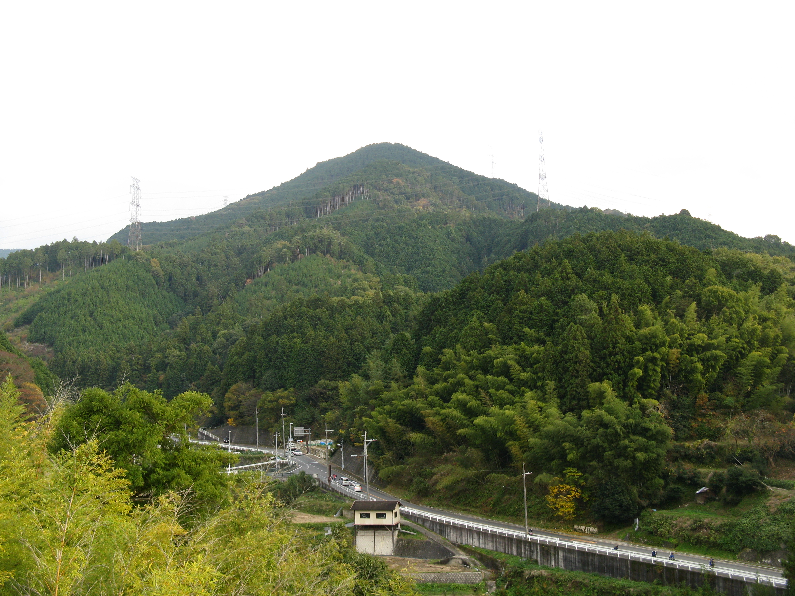 旗尾岳